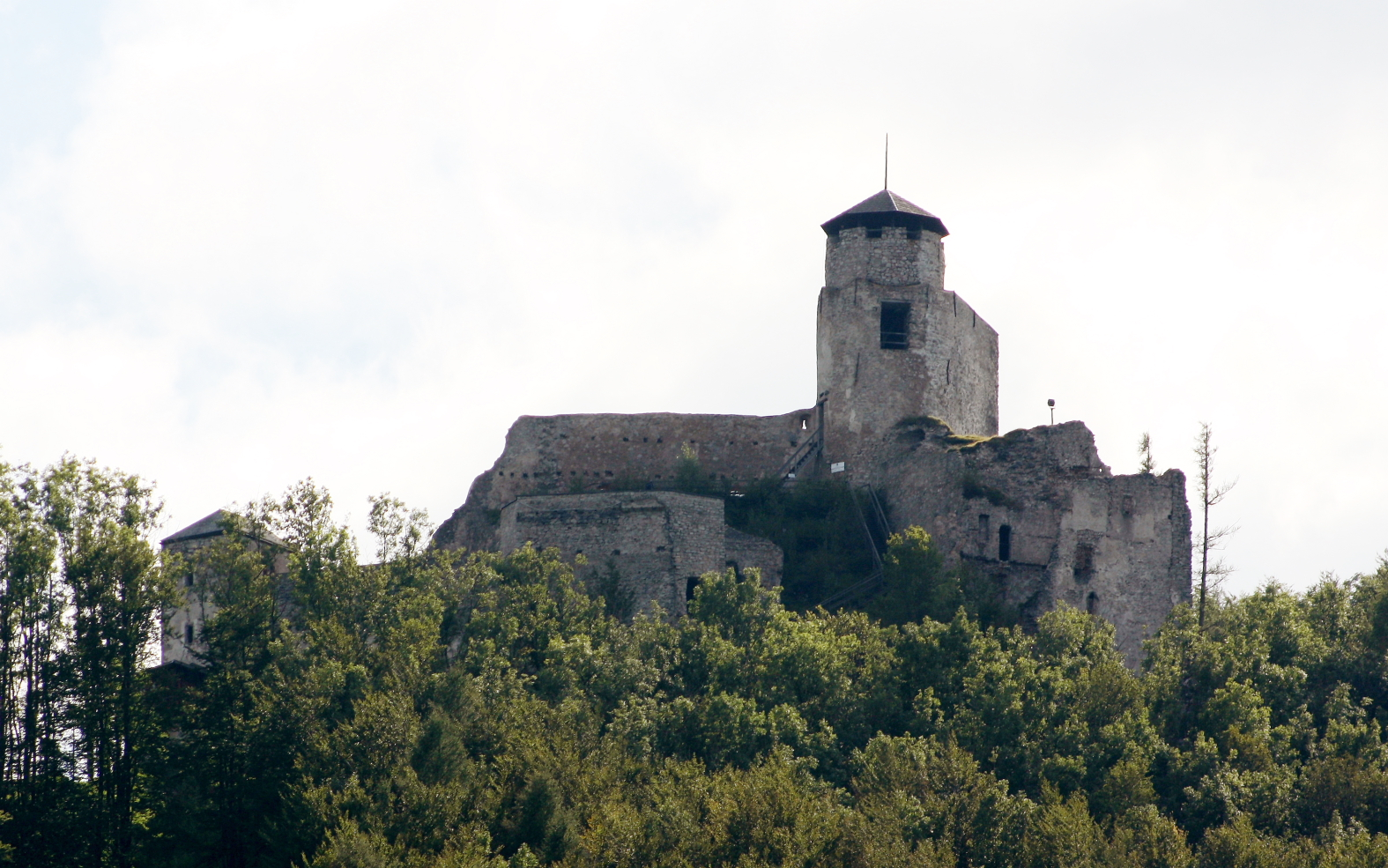 Nordostansicht der Araburg.